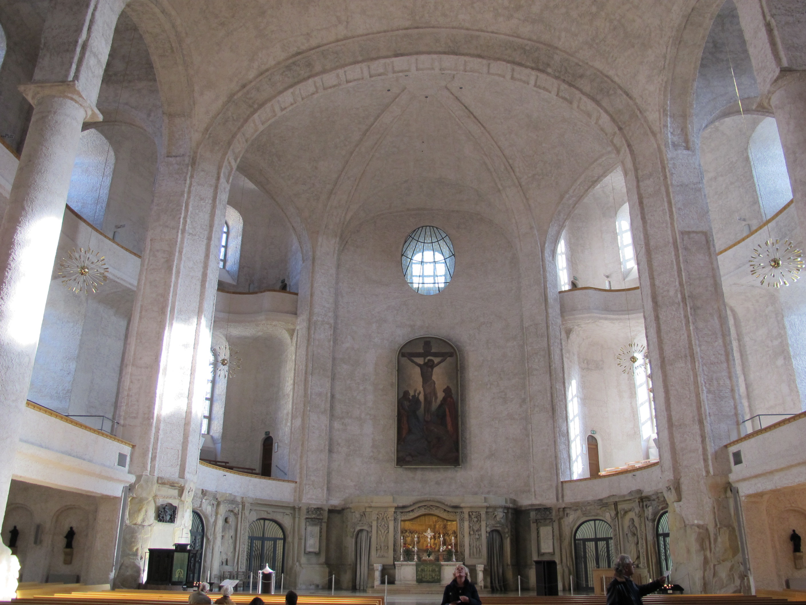 Kreuzkirche, Dresda, interno